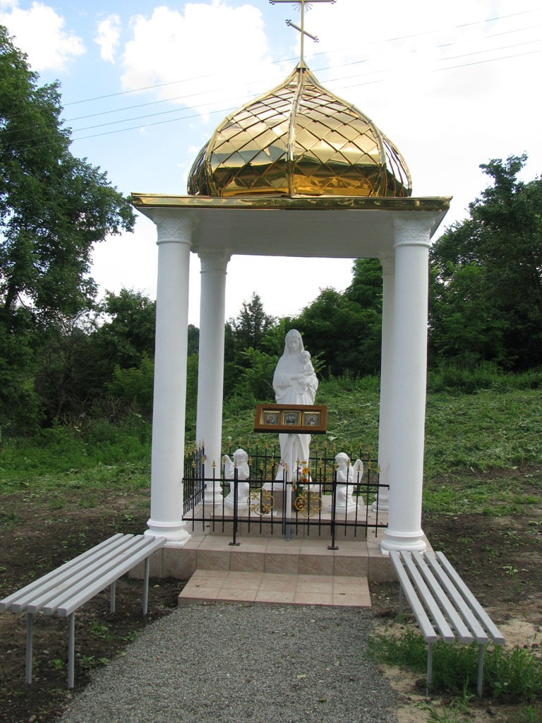 Капличка у селі Саморідня Корсунь-Шевченківського району Черкаської області